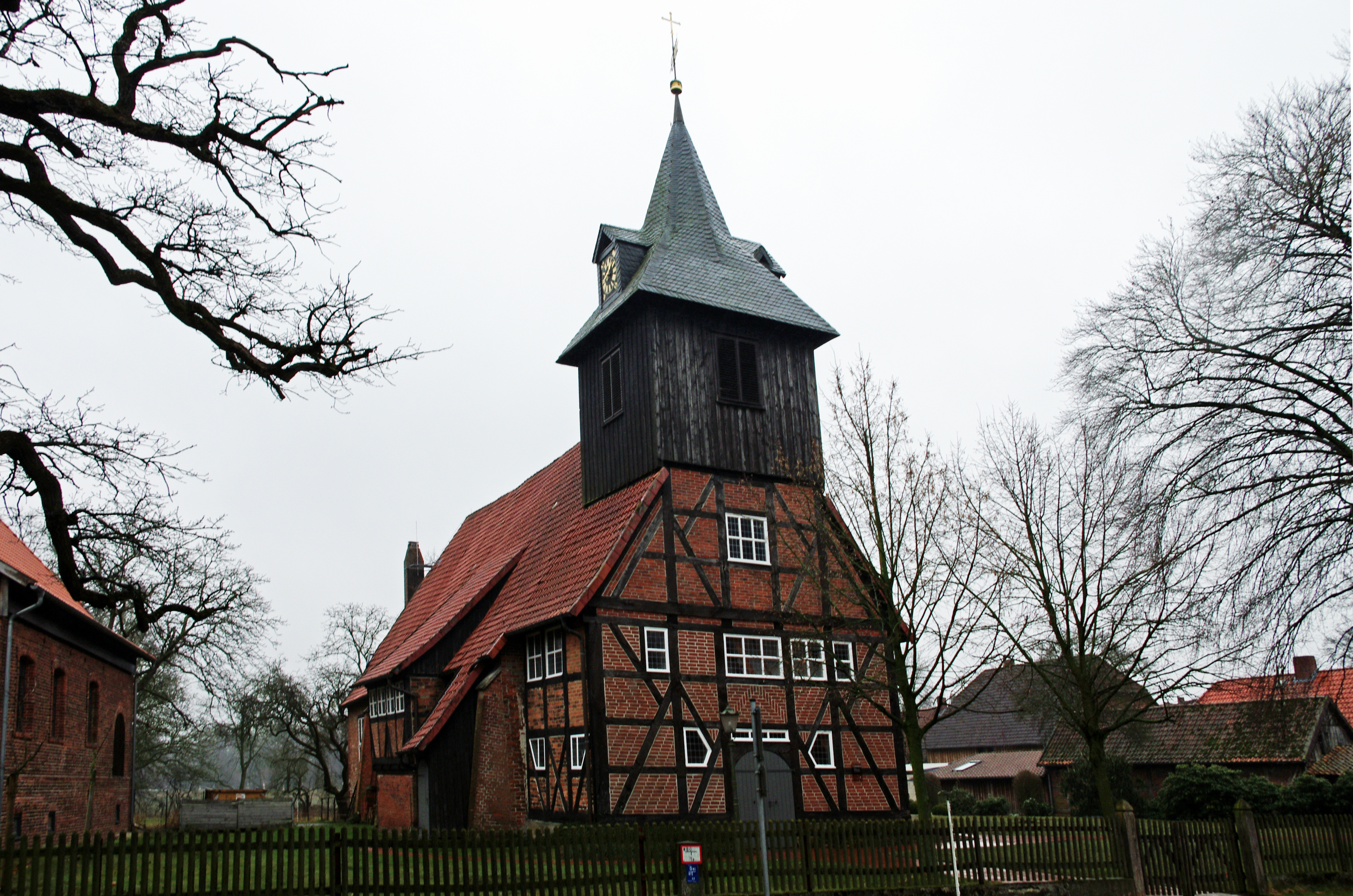 Langlingen im Landkreis Celle. Die Kirche befindet sich direkt am Gutshof und steht unter Denkmalschutz.